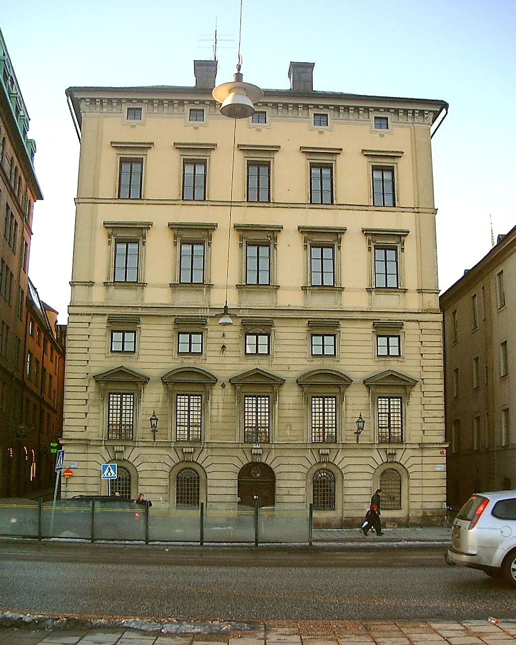 Södra Bankhuset in February 2007.